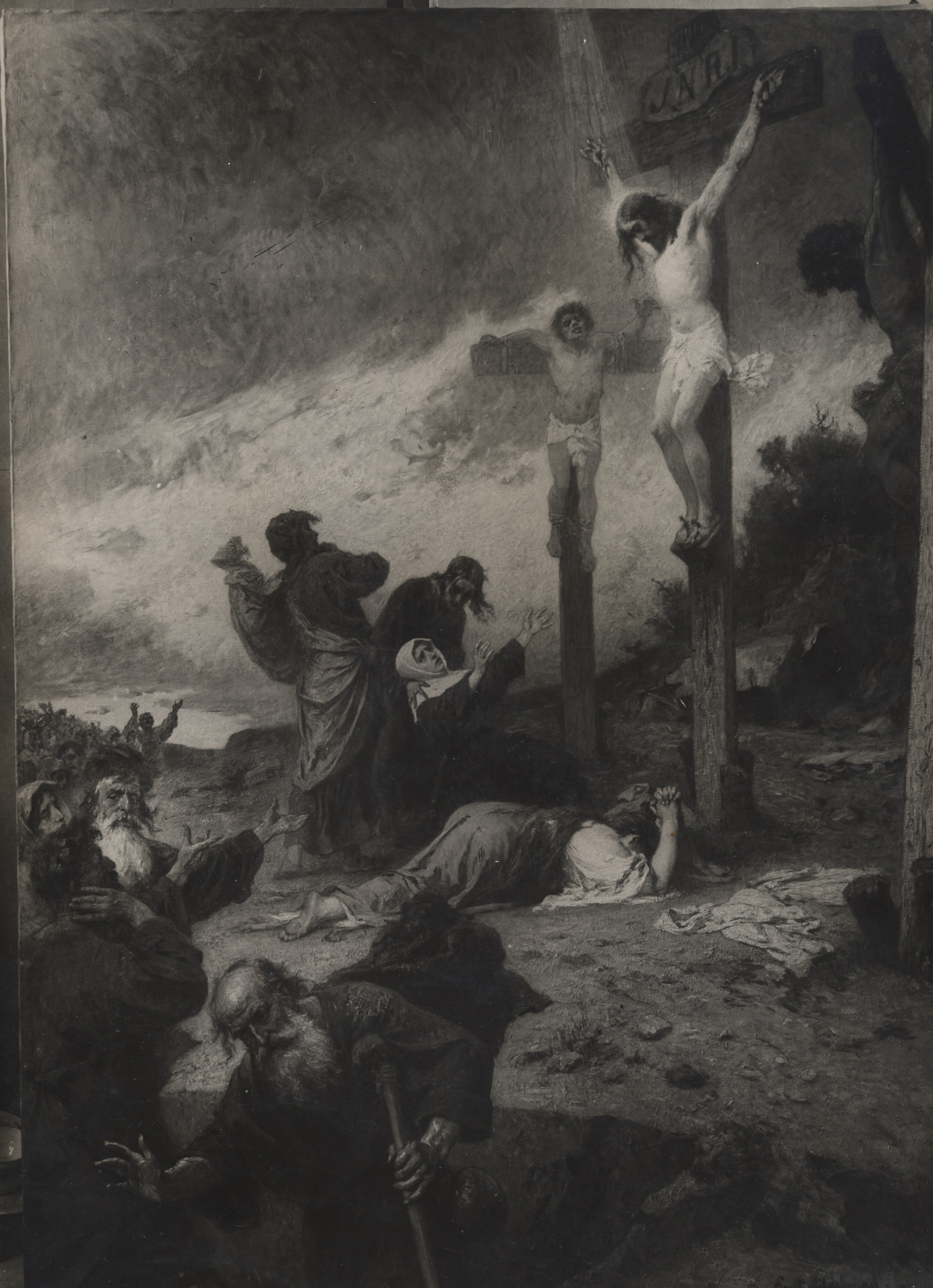 nicht vom Urheber abgeänderte Version